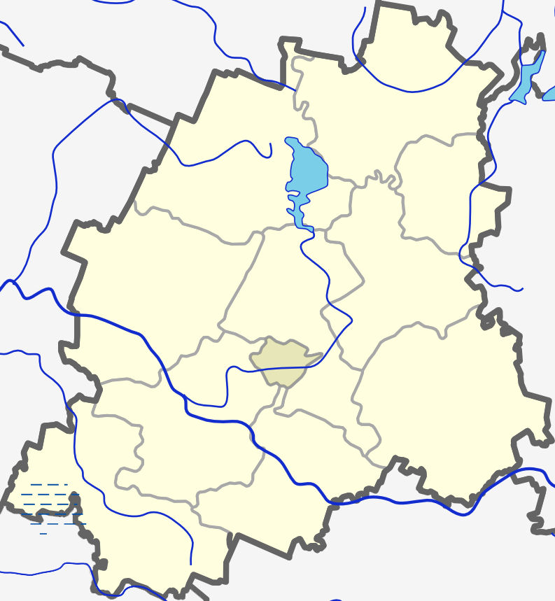 Plungės rajono žemėlapis.